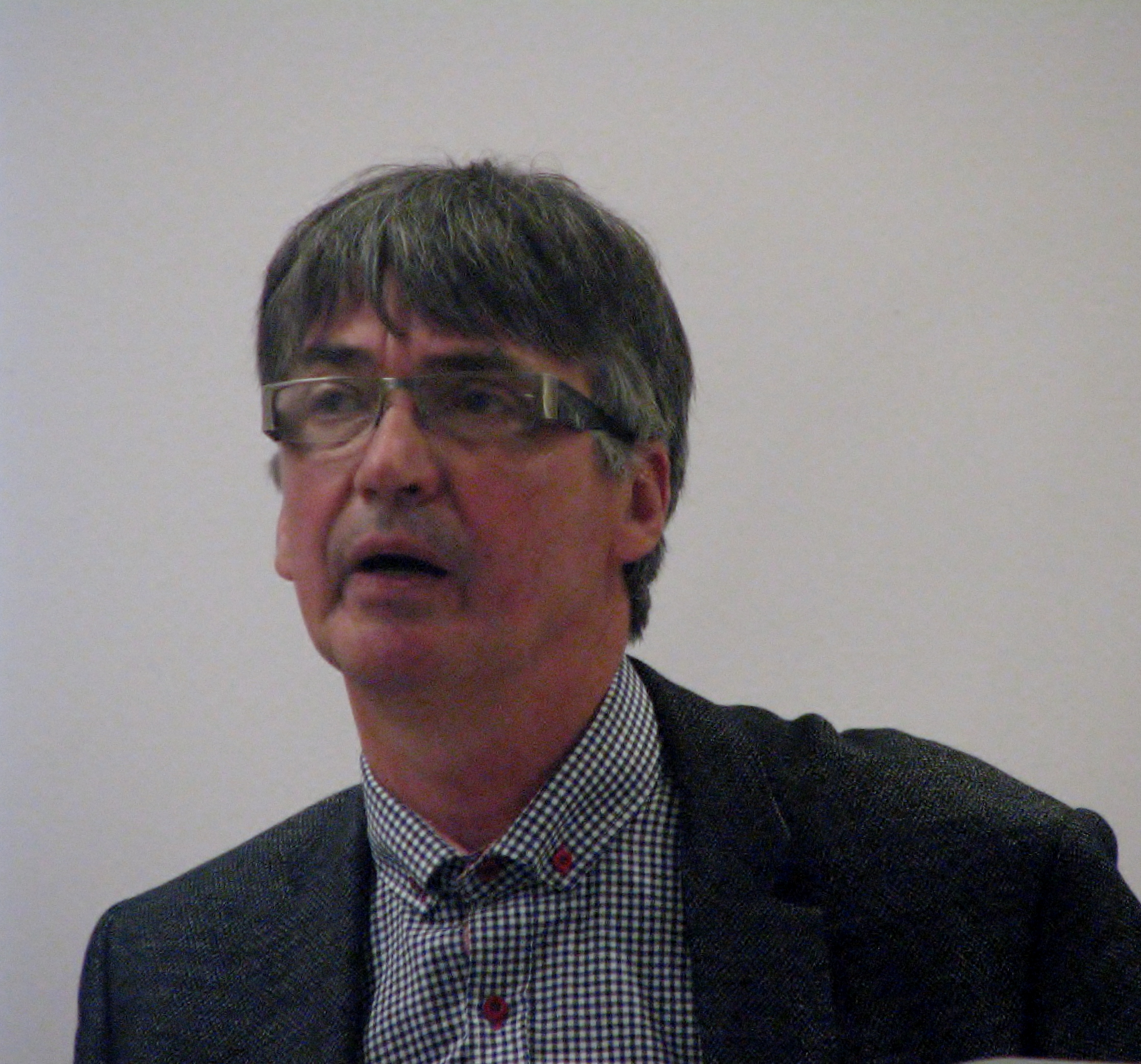 Ülar Ploom esinemas Mihhail Lotmanile pühendatud sümpoosionil